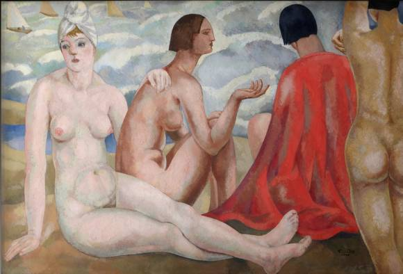 Es de Alfredo Guttero, uno de los artistas claves de la historia del arte argentino; nació en Buenos Aires en 1882 y murió en 1932.